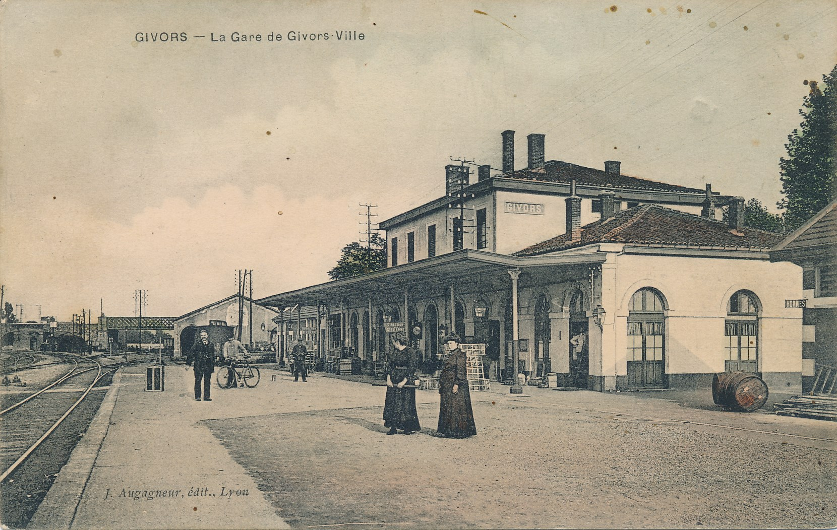 Gare de Givors-ville . Env. 1900. Archives municipales de Givors, cote 5Fi 2325 1